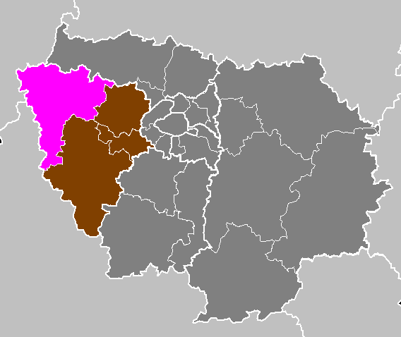 Maps of arrondissements and cantons of France: Département des Yvelines - Arrondissement de Mantes-la-Jolie.PNG (Région Île-de-France)